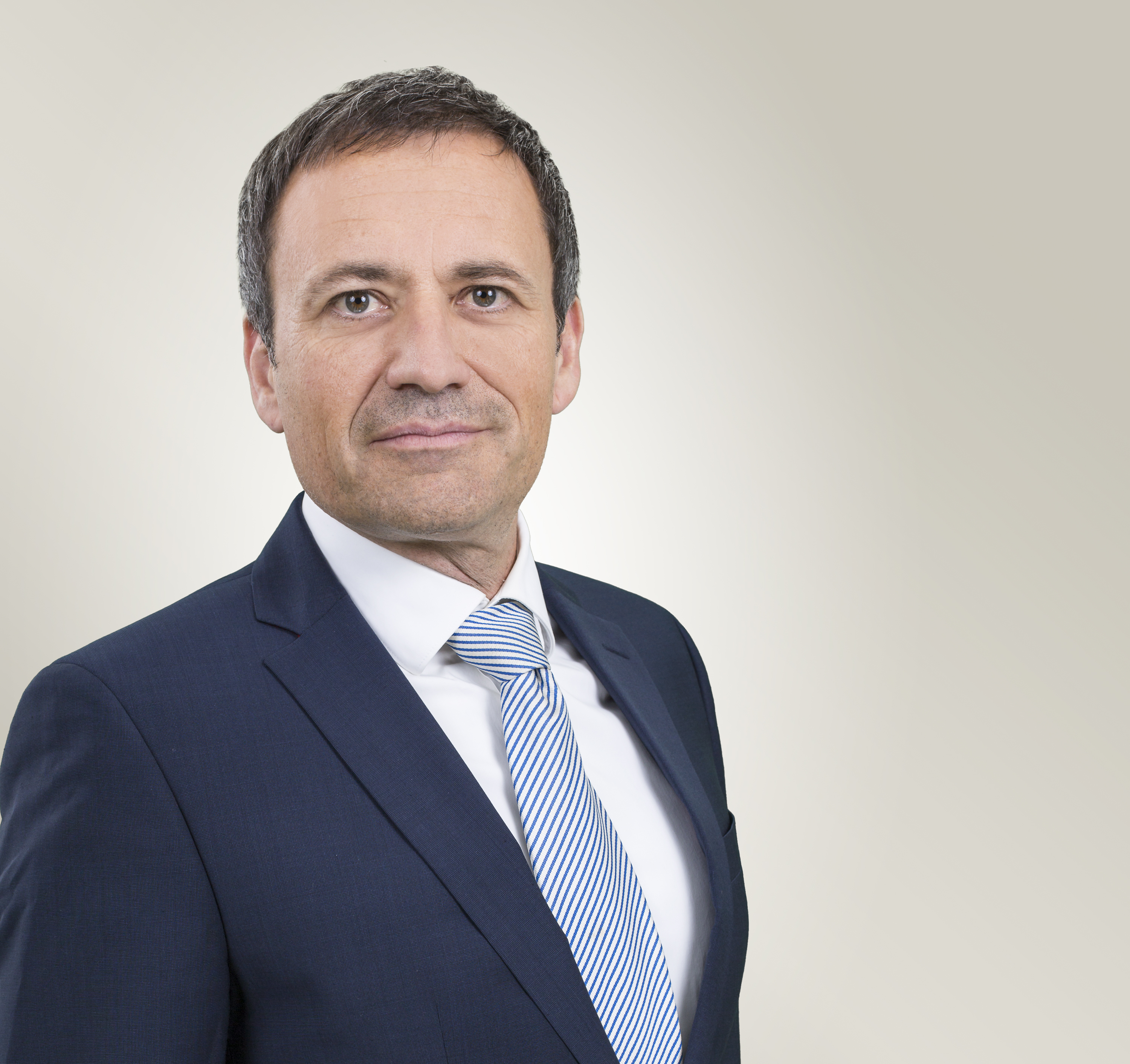 Porträt Gregor Dorfleitner